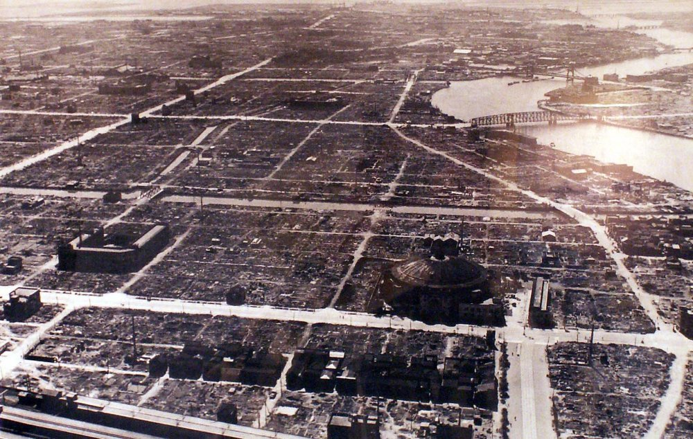 空襲により焦土と化した東京。両国駅付近上空から南に向かい撮影。画面一番下が国鉄両国駅、中央右の大きなドーム状の建物は旧両国国技館（現在は両国シティコアとなっており、新国技館の位置とは異なる）、その前を左右に走るのは京葉道路、右奥が隅田川、見えている橋は手前からトラス橋時代の新大橋（一部は博物館明治村にて保存）と吊り橋時代の清洲橋。